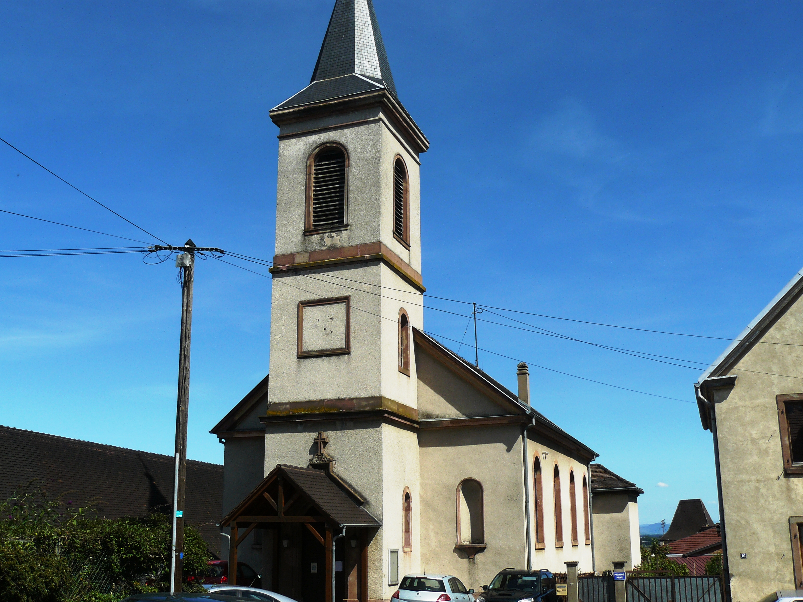 Temple protestant